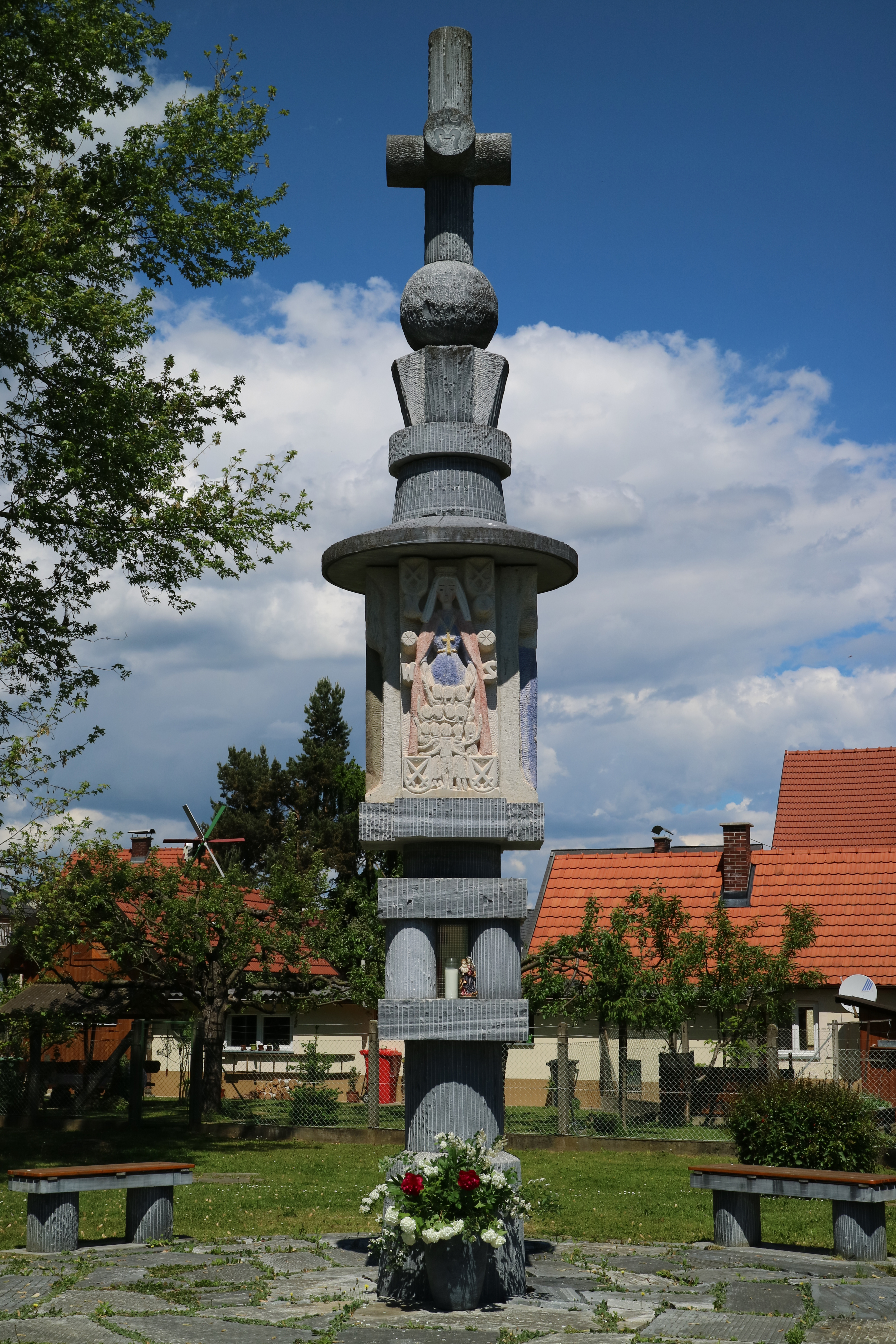 Schutzmantelmadonna-Bildstock von Alfred Schlosser (1995) in Neuseiersberg